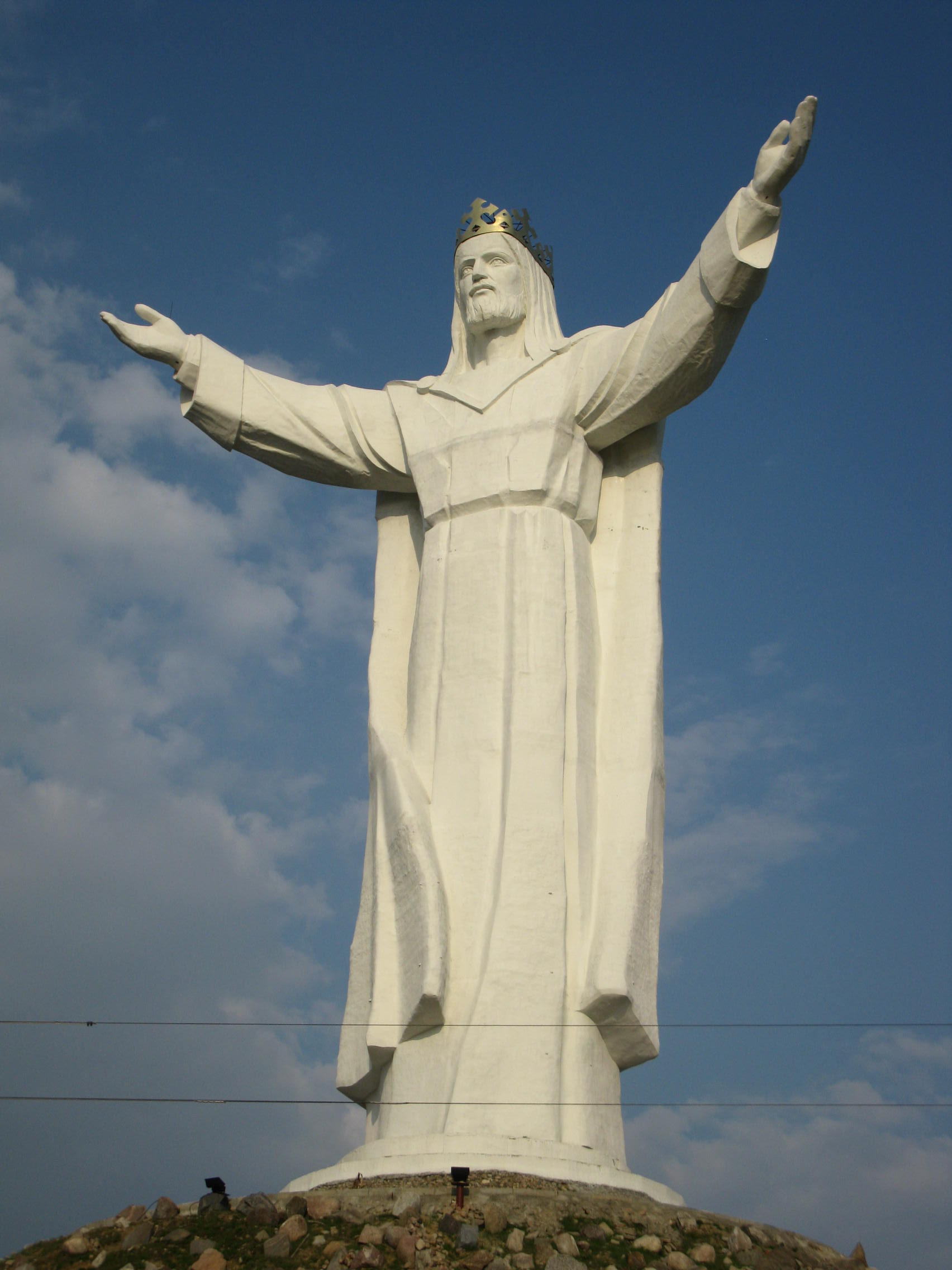 Pomnik Chrystusa Króla w Świebodzinie